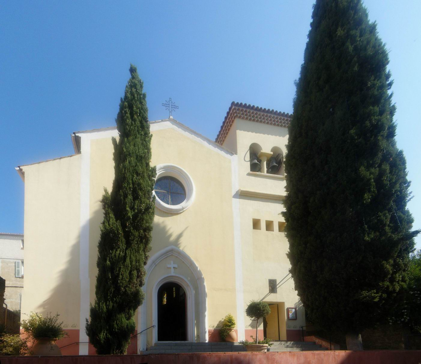 Eglise Saint-Louis du Lavandou